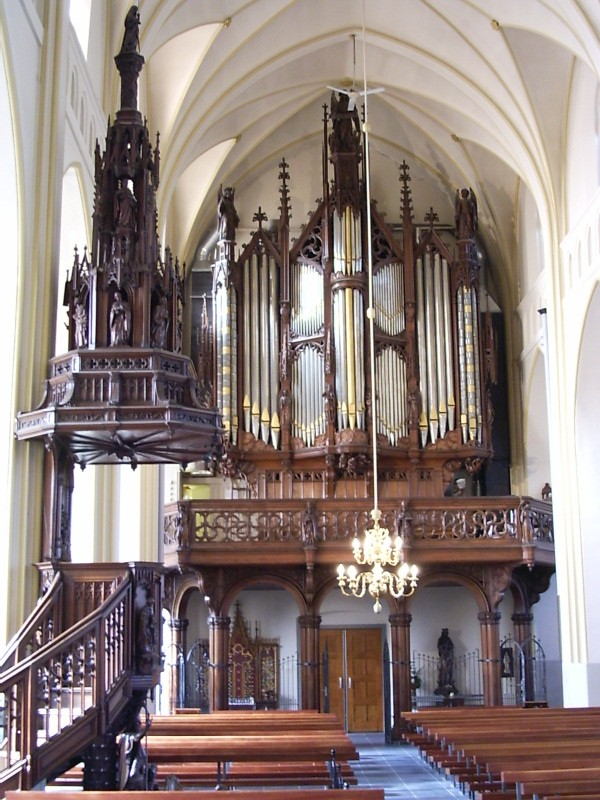 Orgel RK kerk te Schijndel (eigen opname 2004) van orgelbouwer F.C. Smits uit Reek ((Landerd, N-Br). De kerk met het interieur waaronder het orgel, is een rijksmonument